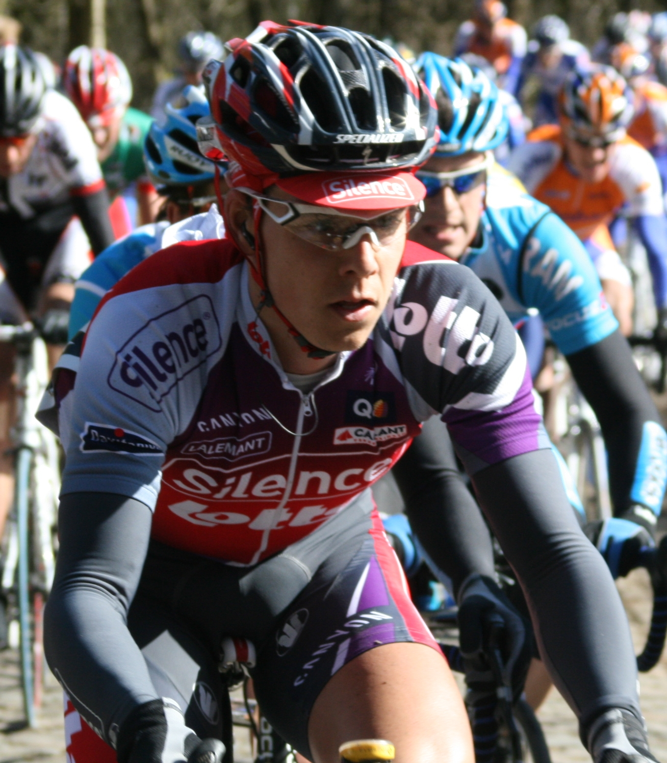 Bart Dockx, lors des Trois jours de Flandre occidentale 2009